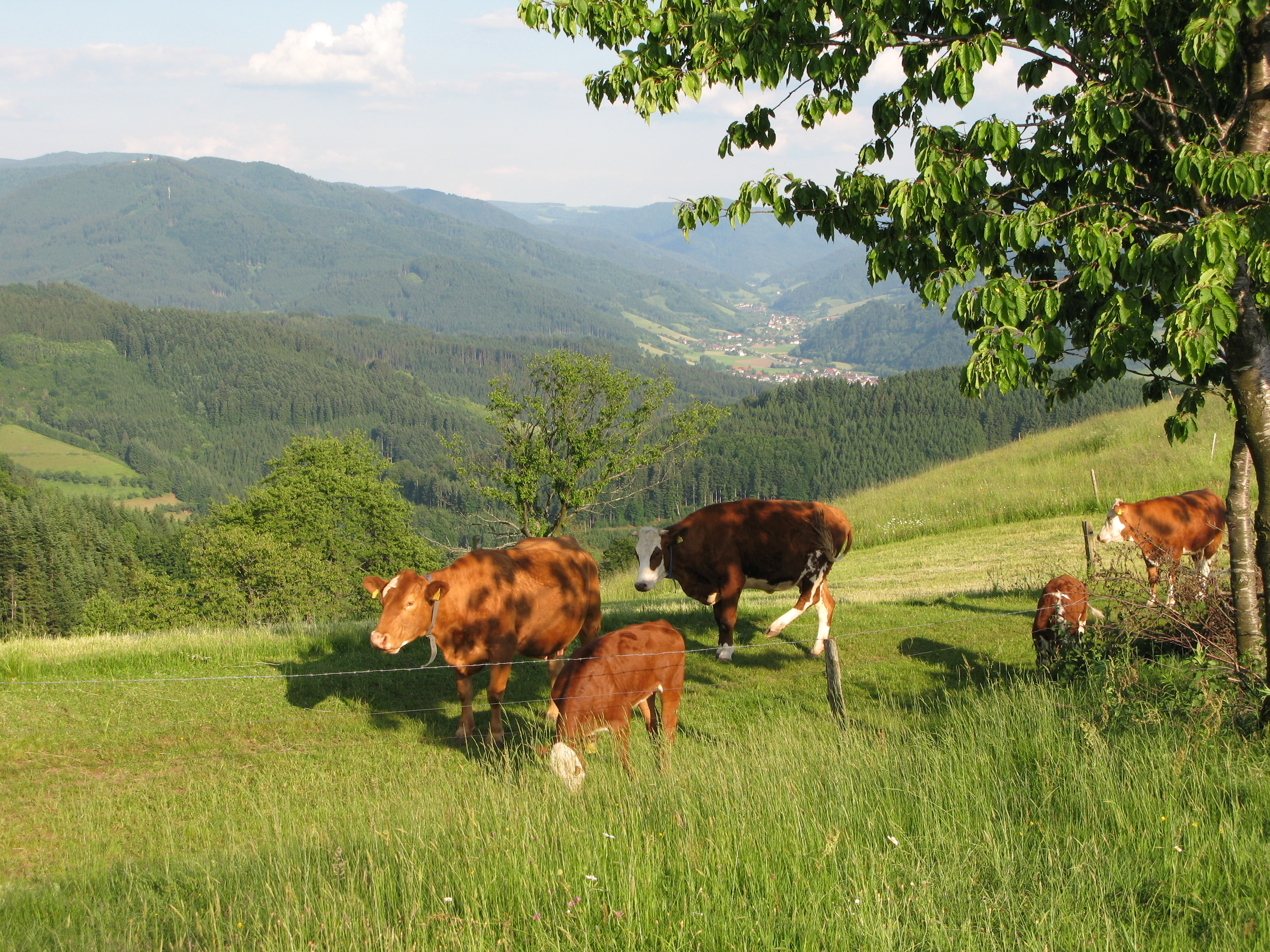 Am Eckleberg auf dem Zweitälersteig und dem Kandelhöhenweg mit Blick auf den Hörnleberg mit der Kapelle und in das Simonswäldertal